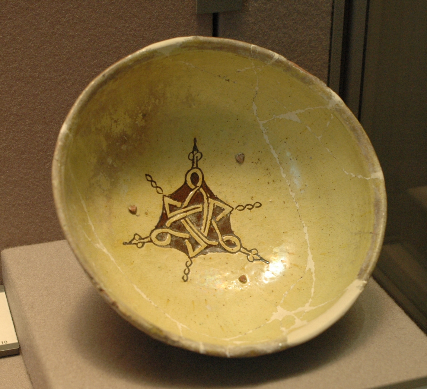 Cup, Constantinople, 13th–14th c., earthenware with champlevé décoration.